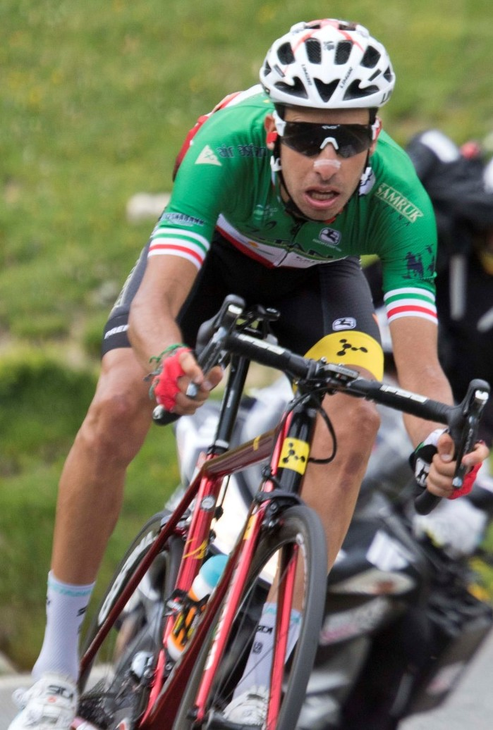 19-7_7 aru